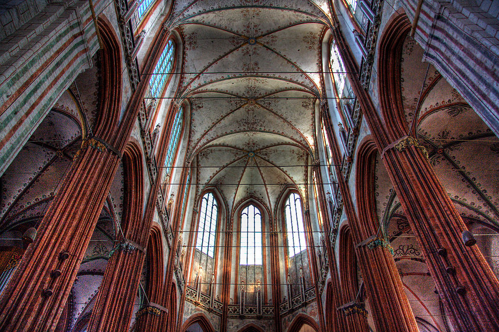 Lübeck, Marienkirche